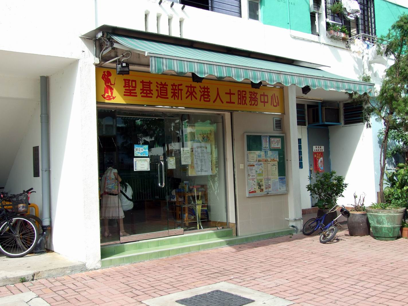 聖公會聖基道兒童院新來港人士服務中心